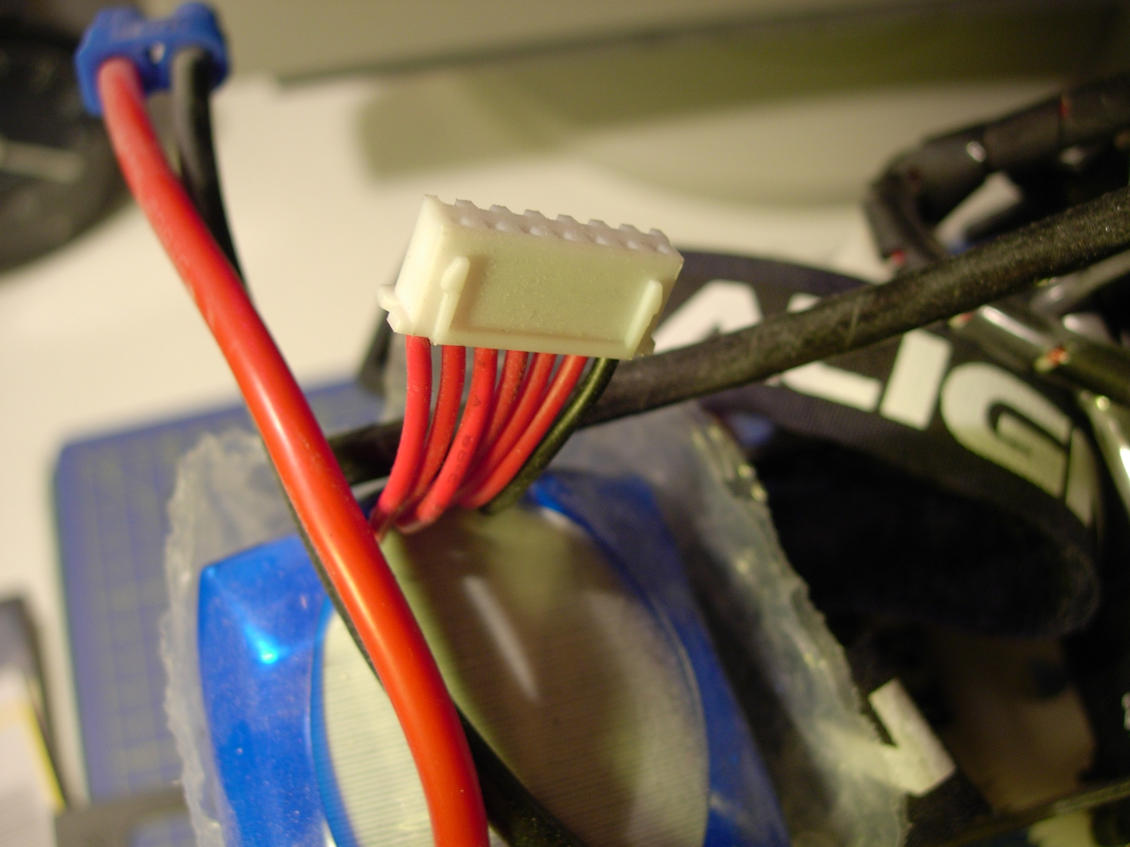 Fotografie des Balancer Steckers vom Typ 'XH' an einem 6s (6 Zellen seriell) LiPo Akkus